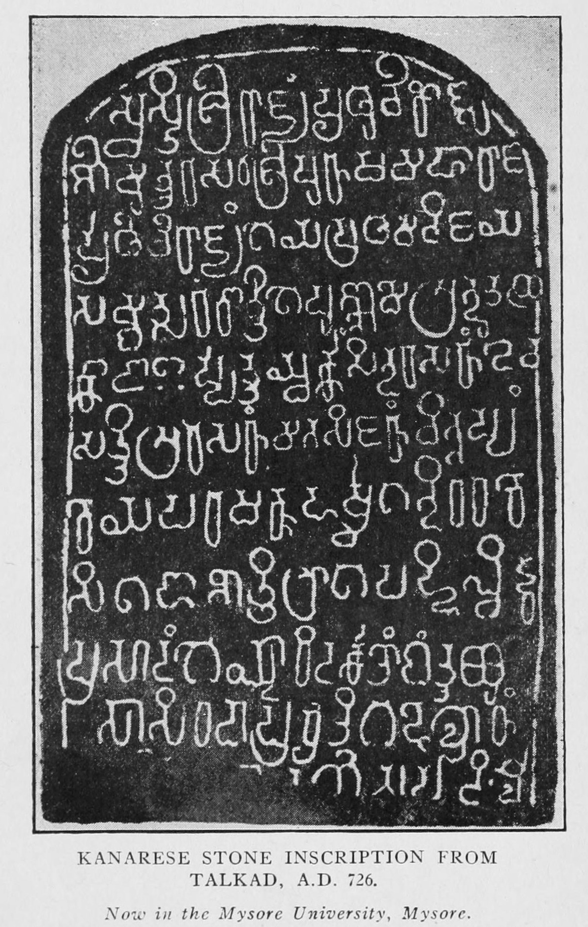 Inscription from Talakad, Karnataka